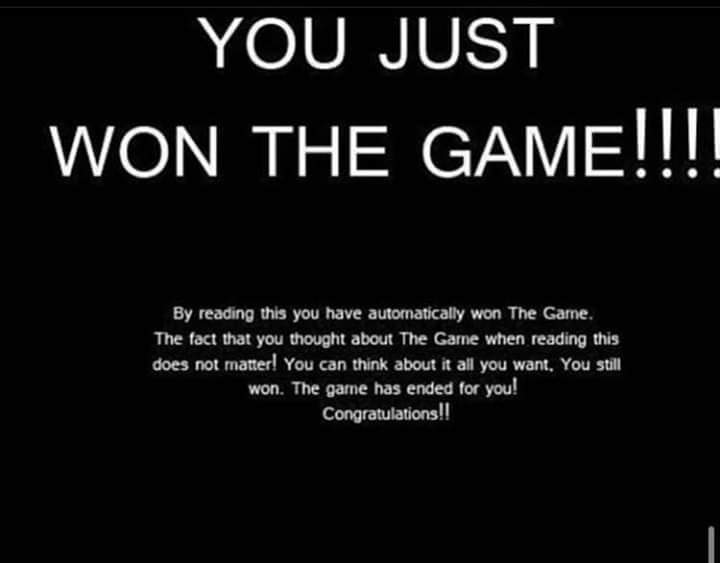 Právě jste vyhráli hru, gratuluji!